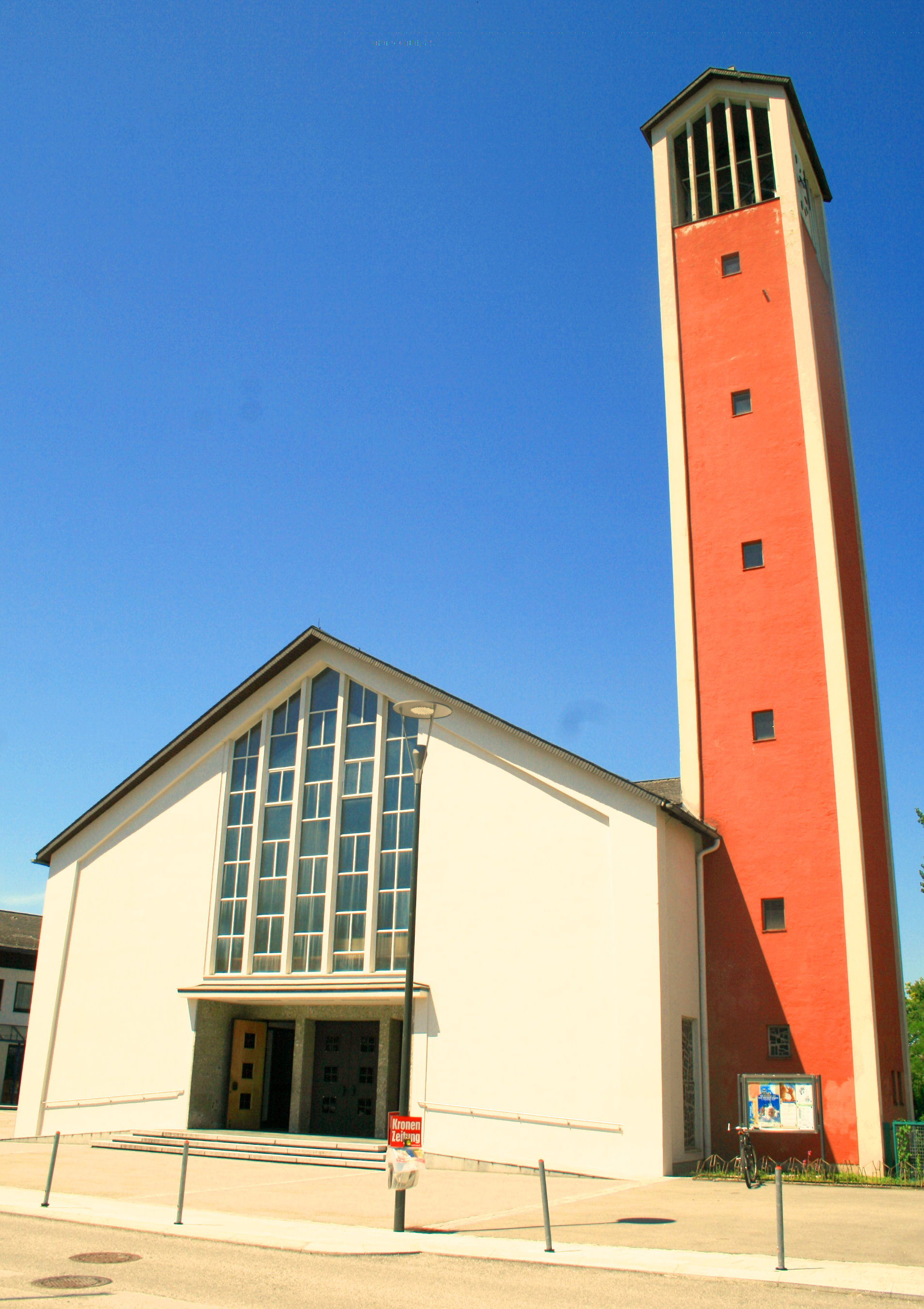 Kath. Pfarrkirche hl. Johannes Capistran